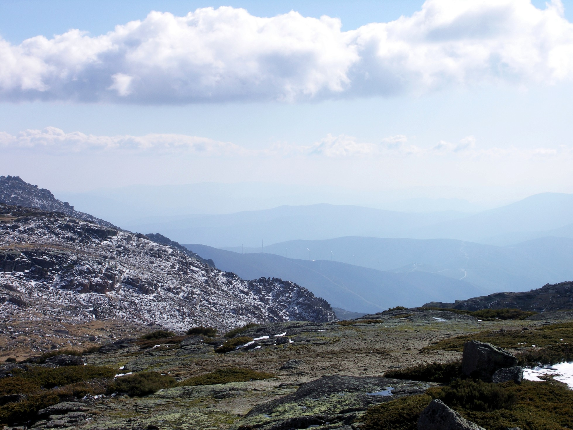 Serra da Estrela, Portugal